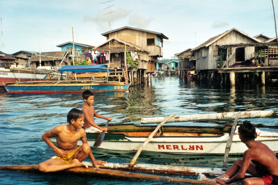 Philippinen Basilan Seezigeuner